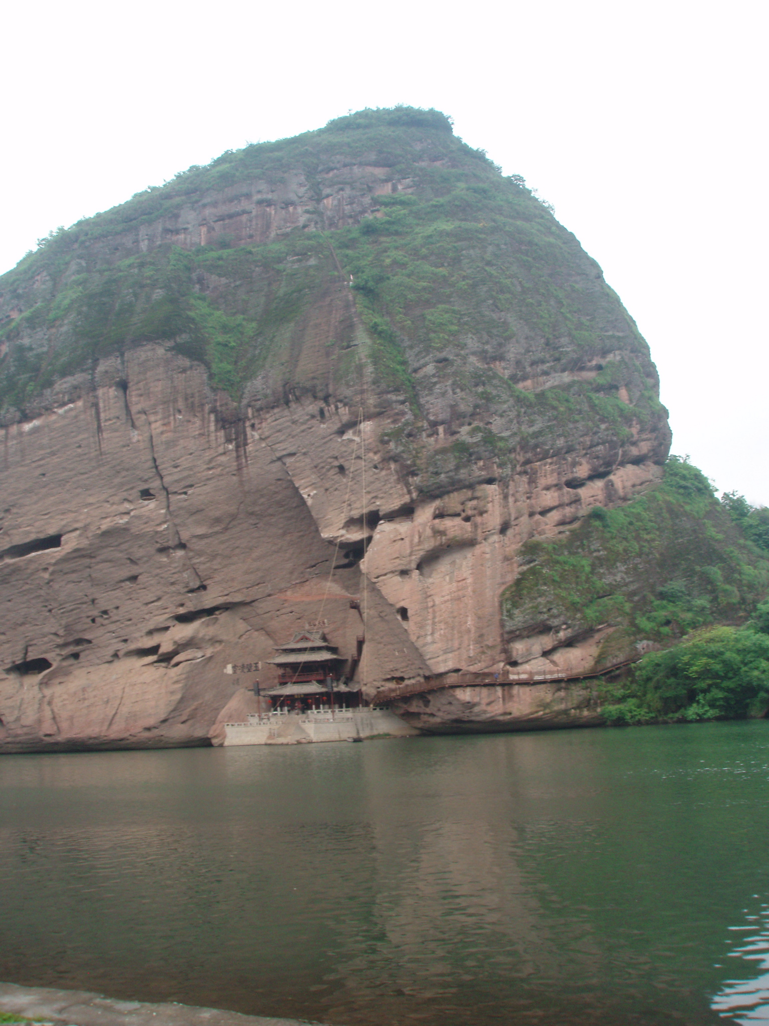 Longhu Shan, Jiangxi Province